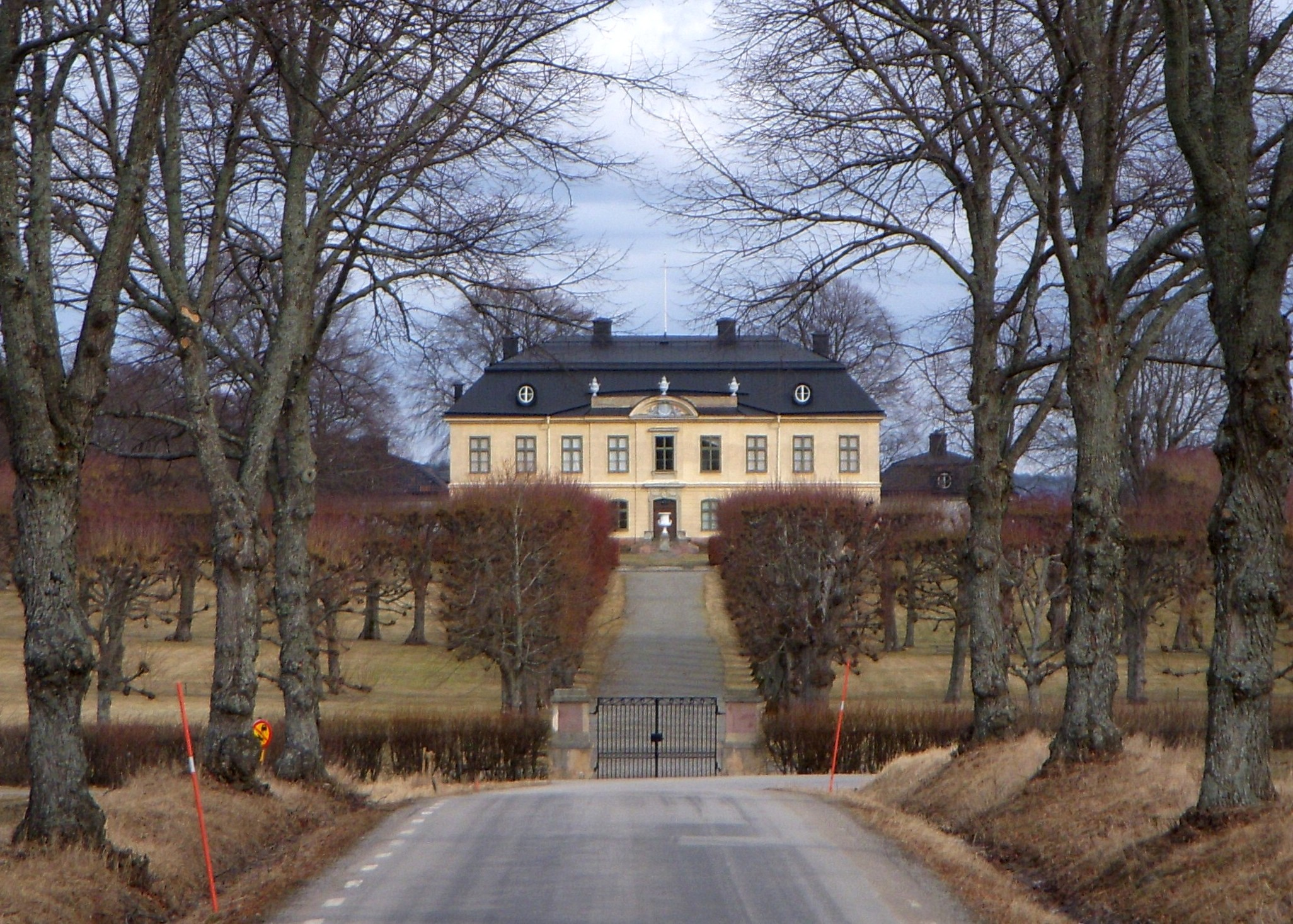 Sturehovs slott och allén från väst